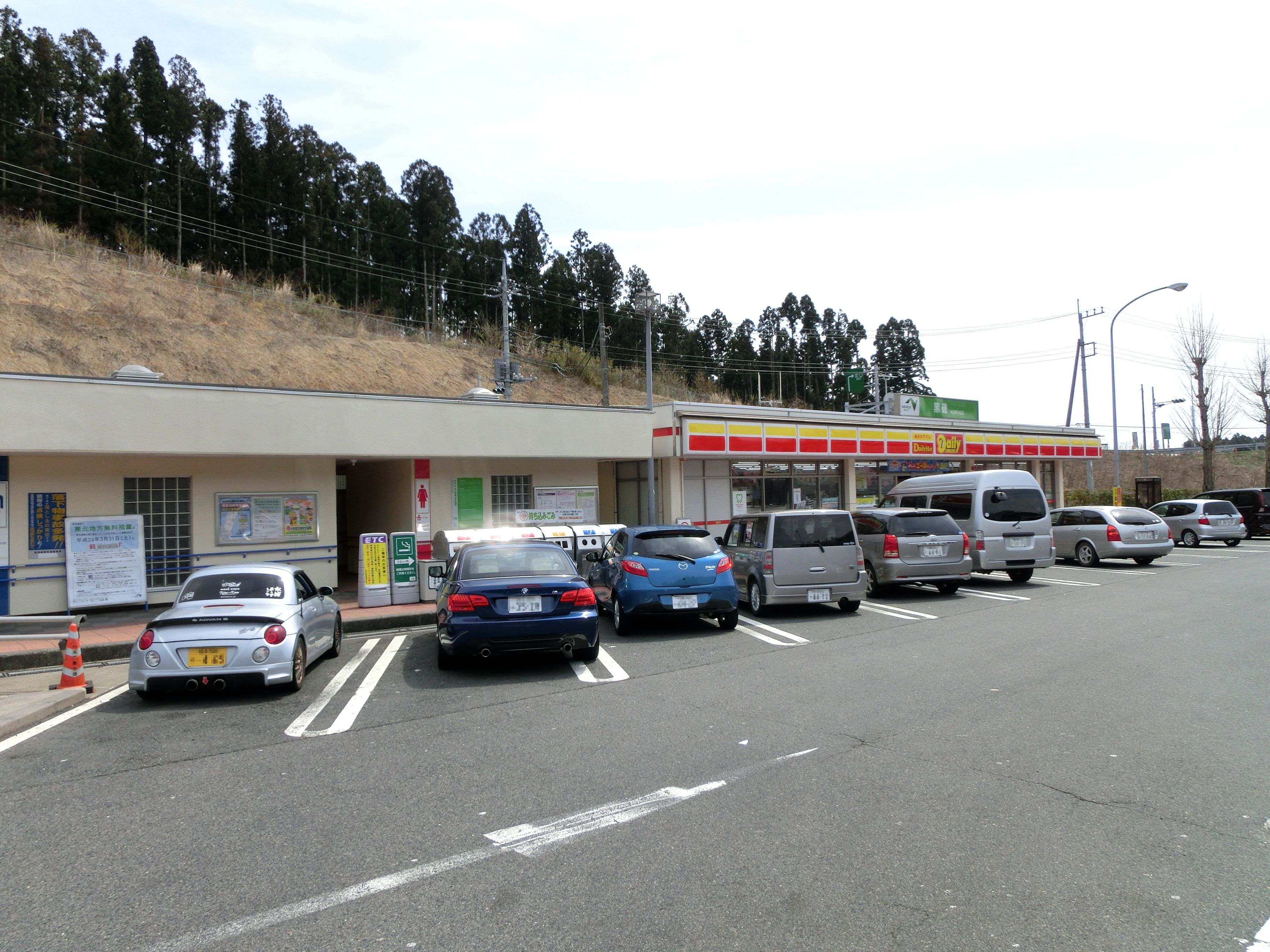 東北自動車道 黒磯パーキングエリア（上り線）